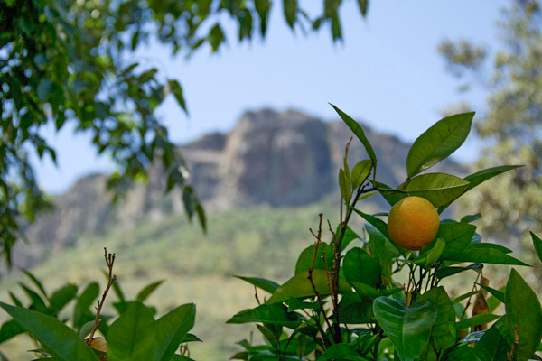 Un naranjo del poblado del Salto de Saucelle, en el Parque Natural de Arribes del Duero, España.